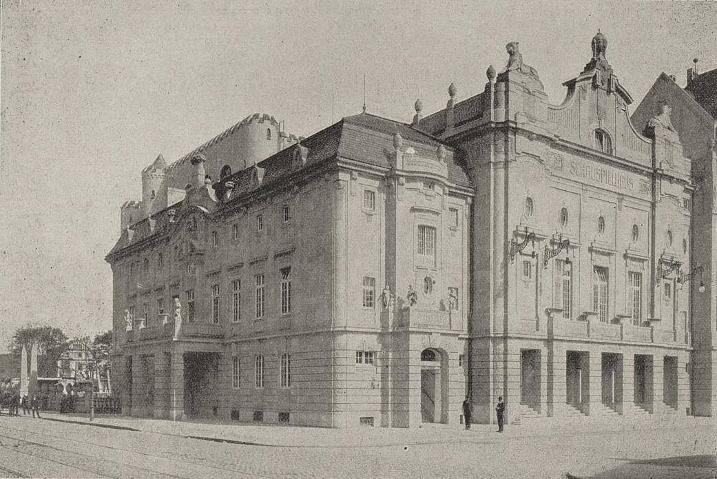 Düsseldorfer Schauspielhaus. Hauptansicht, Ecke Karl Theodor- und Kasernenstraße, Bild aus der Denkschrift der Baufirma Boswau & Knauer, 1905